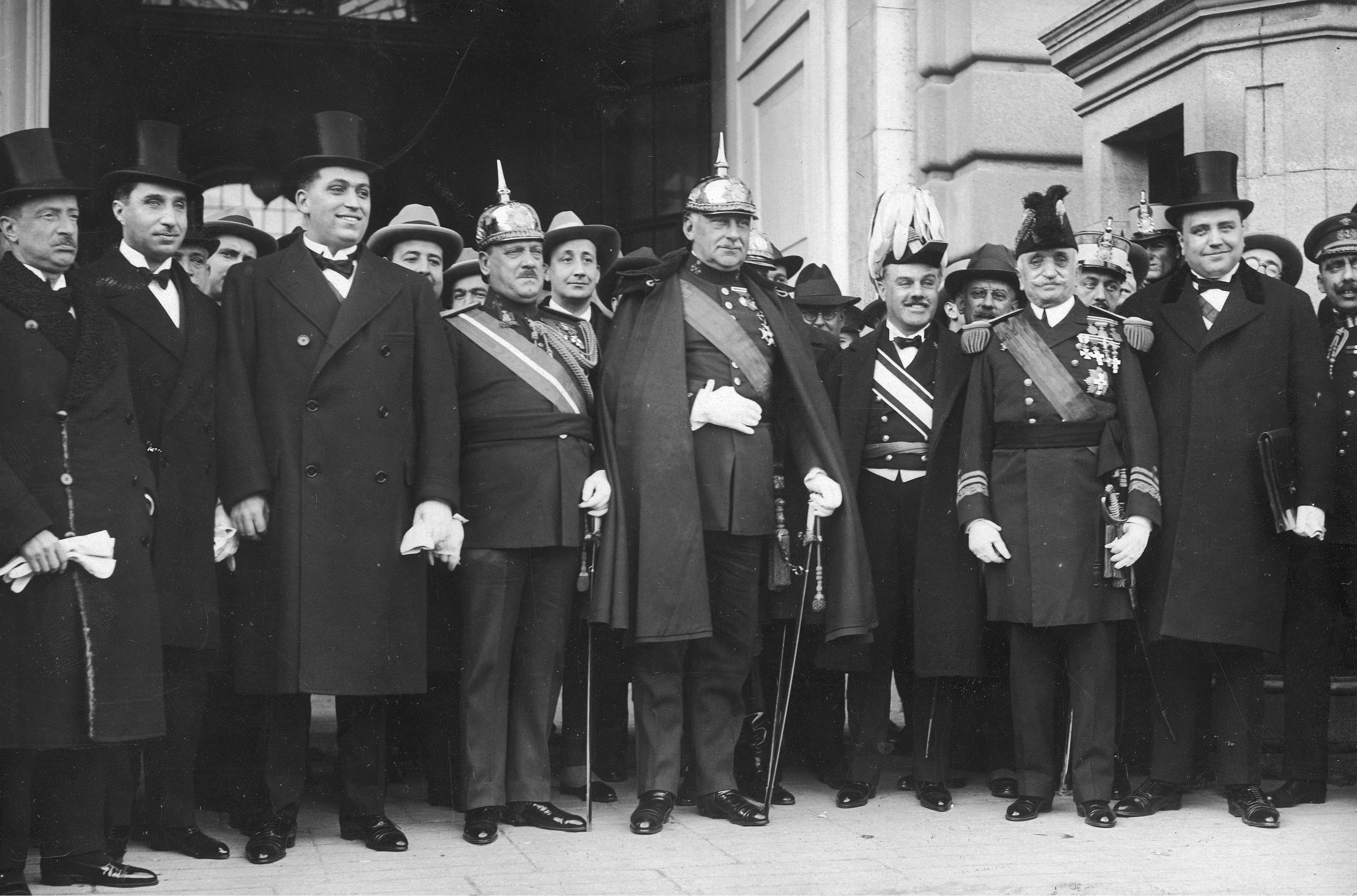 El Directorio civil de Primo de Rivera, el día de su constitución en Madrid. En la fotografía aparecen, entre otros, Miguel Primo de Rivera, José Calvo Sotelo, Galo Ponte, Honorio Cornejo Carvajal, Severiano Martínez Anido, Eduardo Aunós o José de Yanguas Messía.